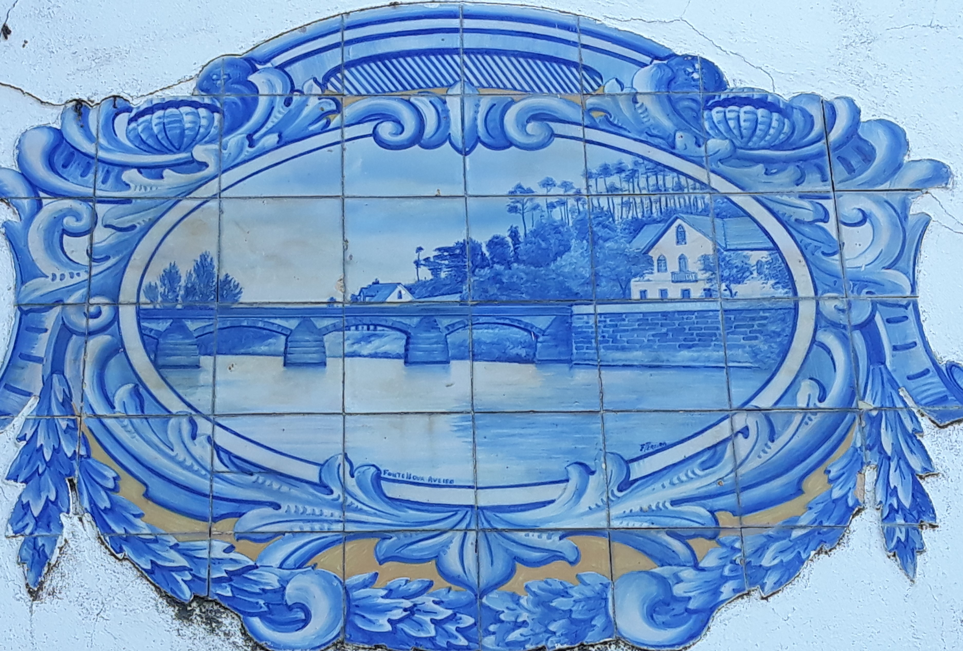 painel azuleijos